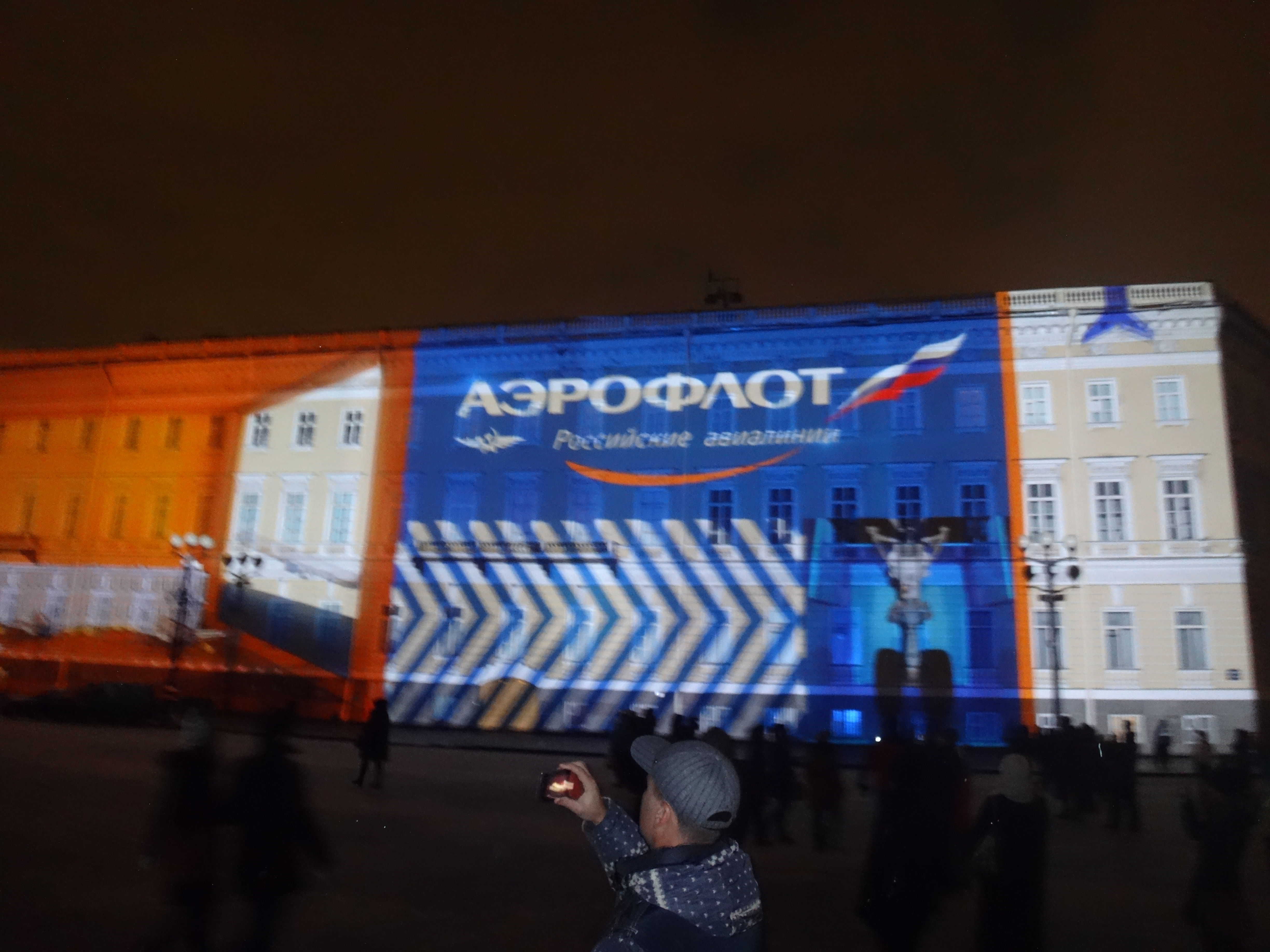 Светошоу на Дворцовой